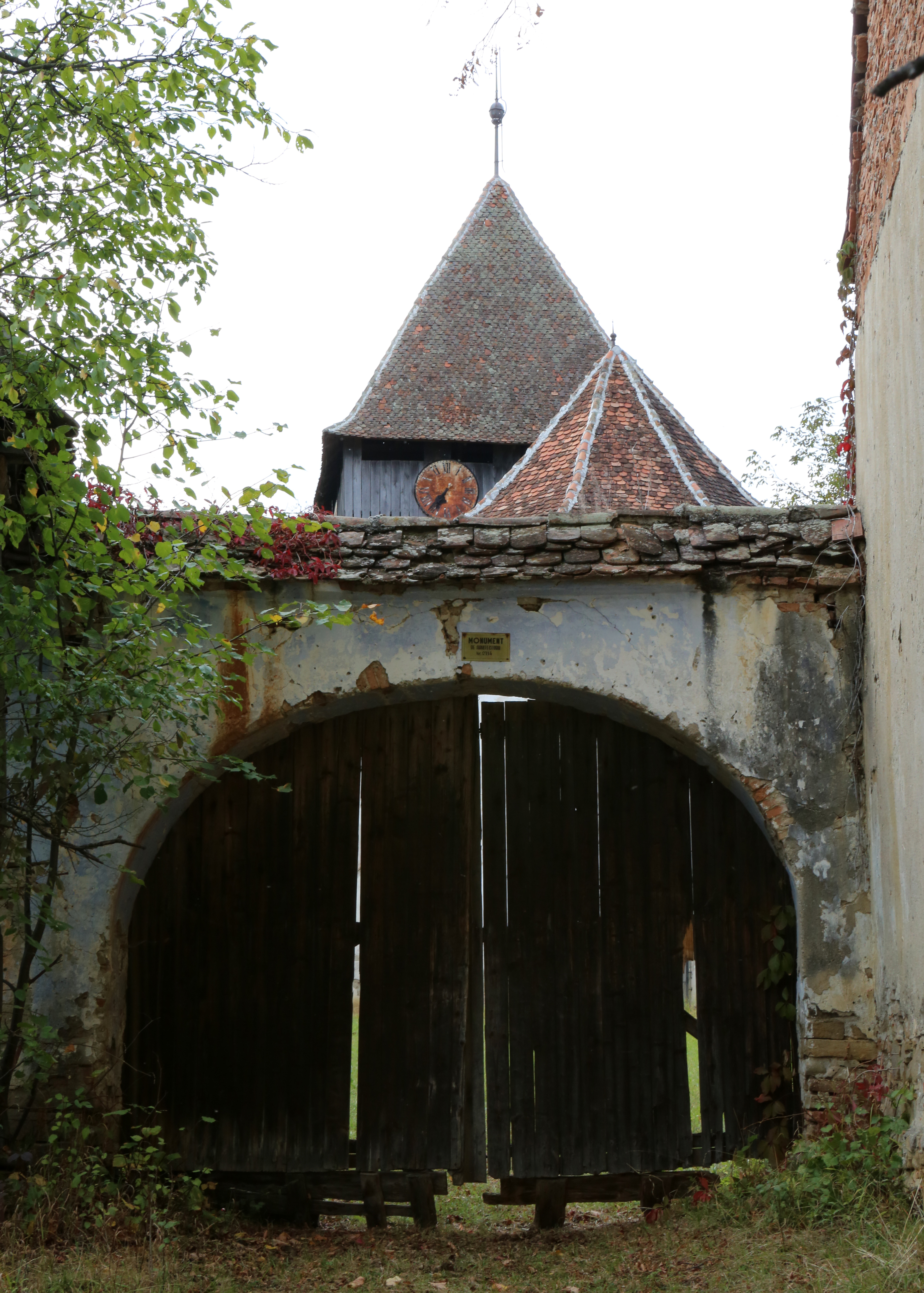 Incintă fortificată, anexe 02